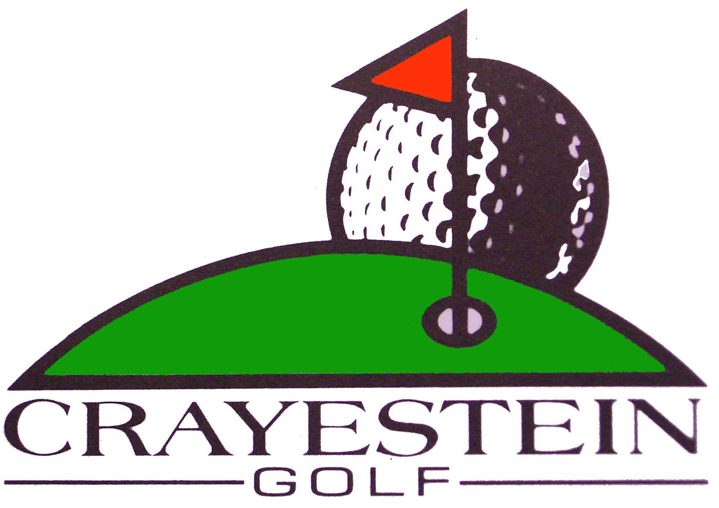 Golfbaan Crayestein, logo